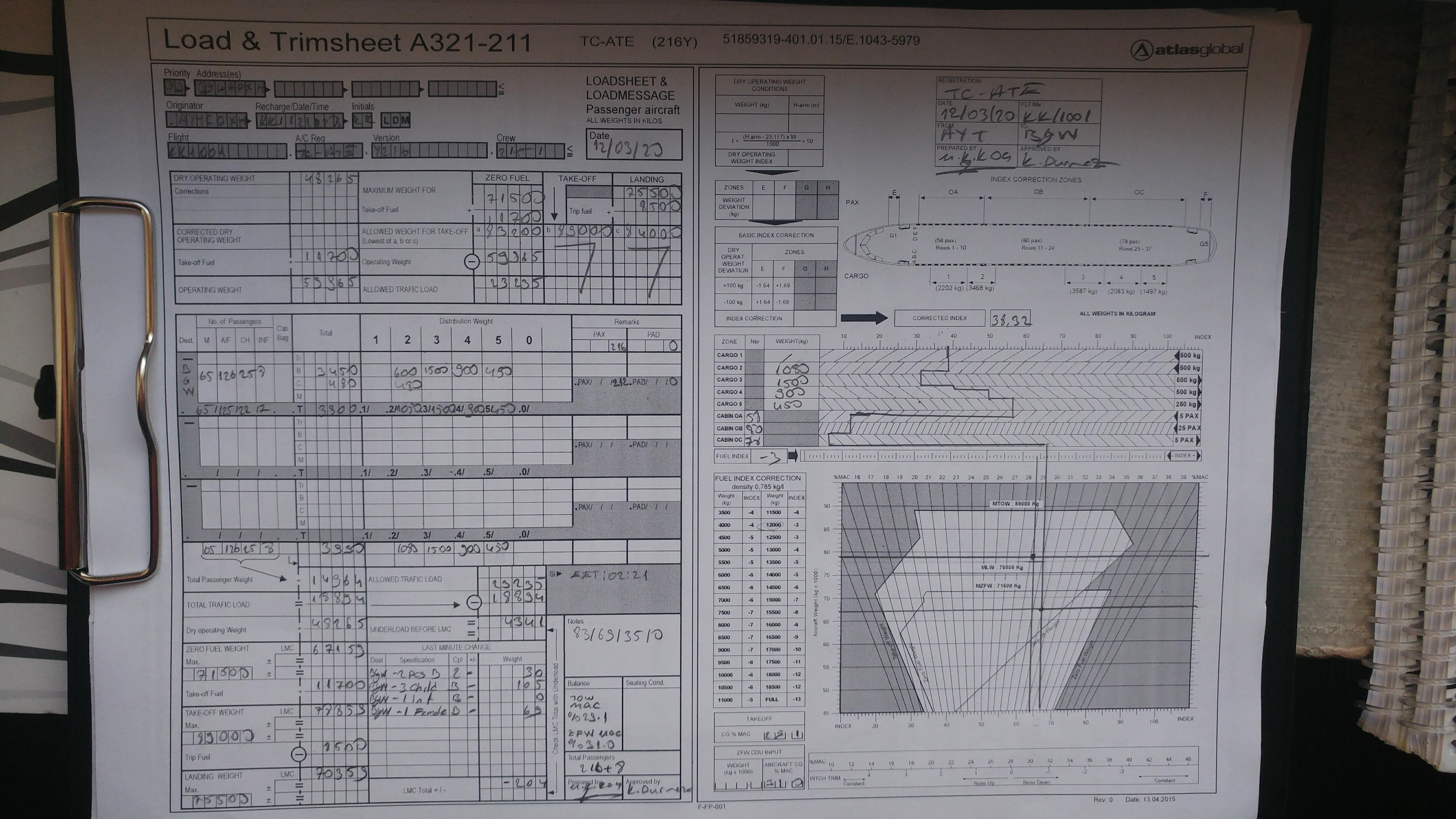 kendi çektiğim fotoğraftır. istenildiği gibi dağıtılabilir, çoğaltılabilir.